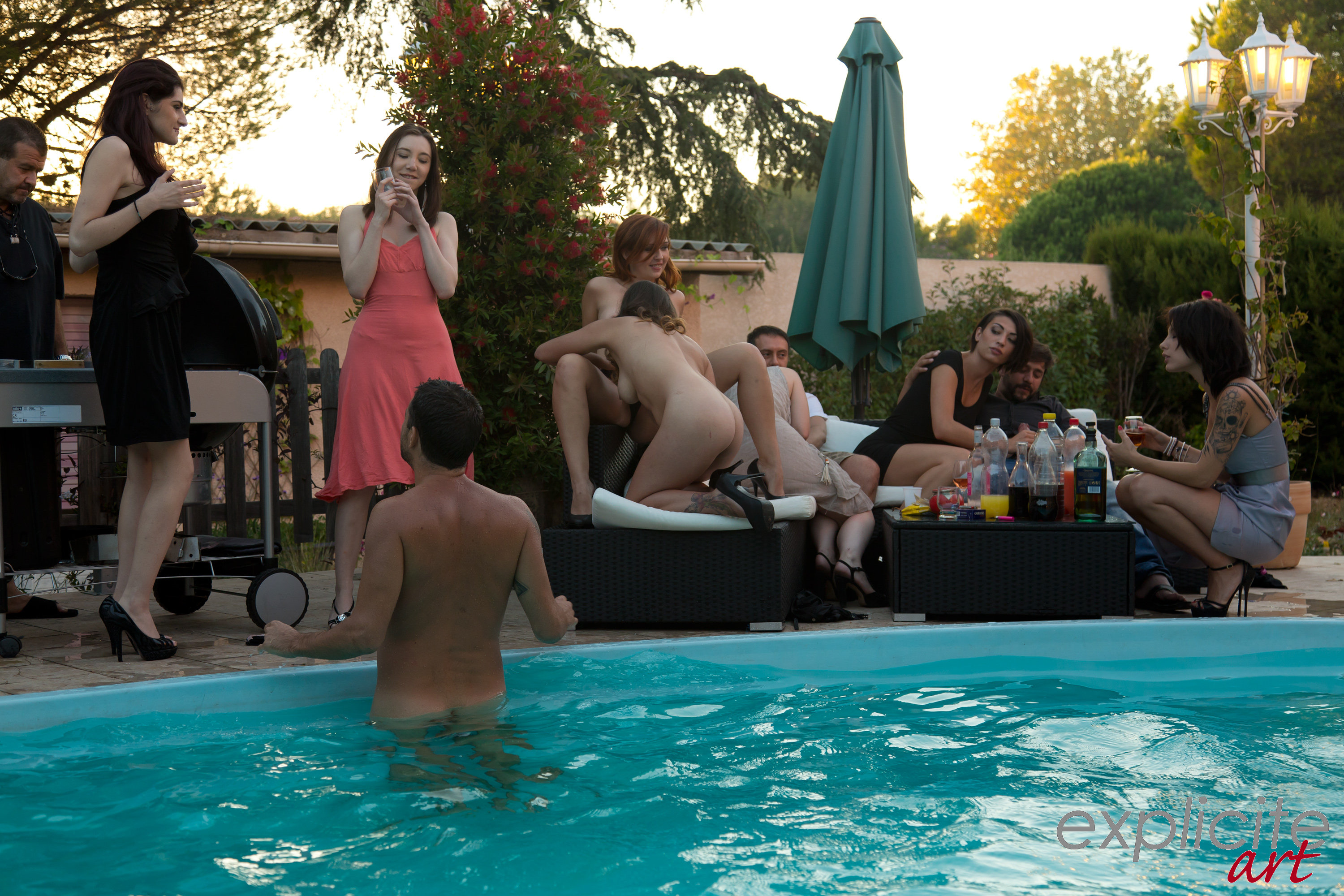 Tournage du film "Des filles libres", de John B. Root